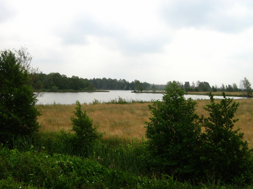 Alter Torfstich im Grenztalmoor zwischen den Stromtälern der Recknitz und der Trebel. (Mecklenburg-Vorpommern) 54°6′17.74″N 12°41′27.98″E / 54.1049278°N 12.6911056°E